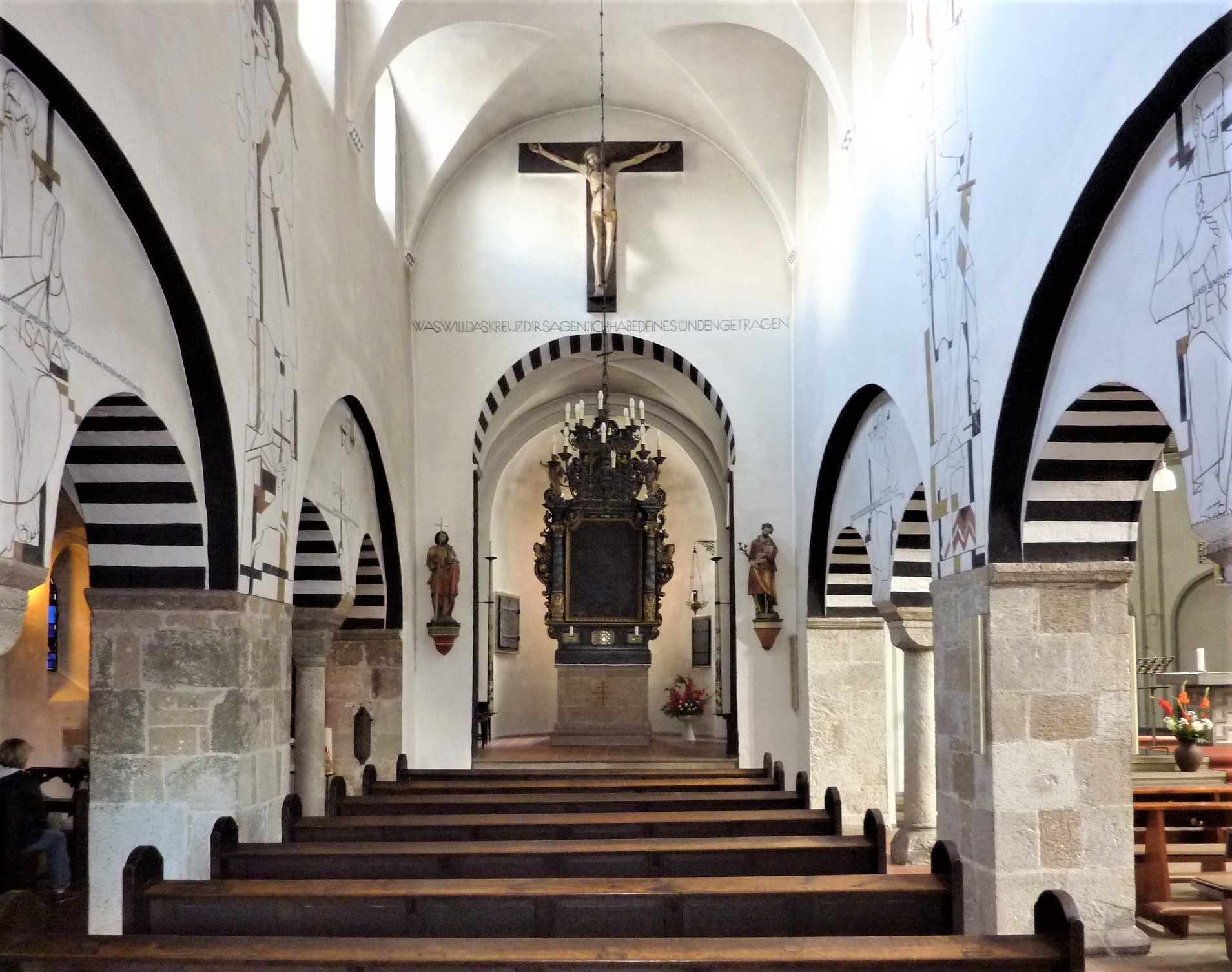 St. Clemens (Bergisch Gladbach)